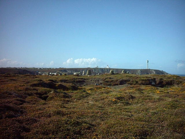 Lieu : Île d'Ouessant (Bretagne/France)